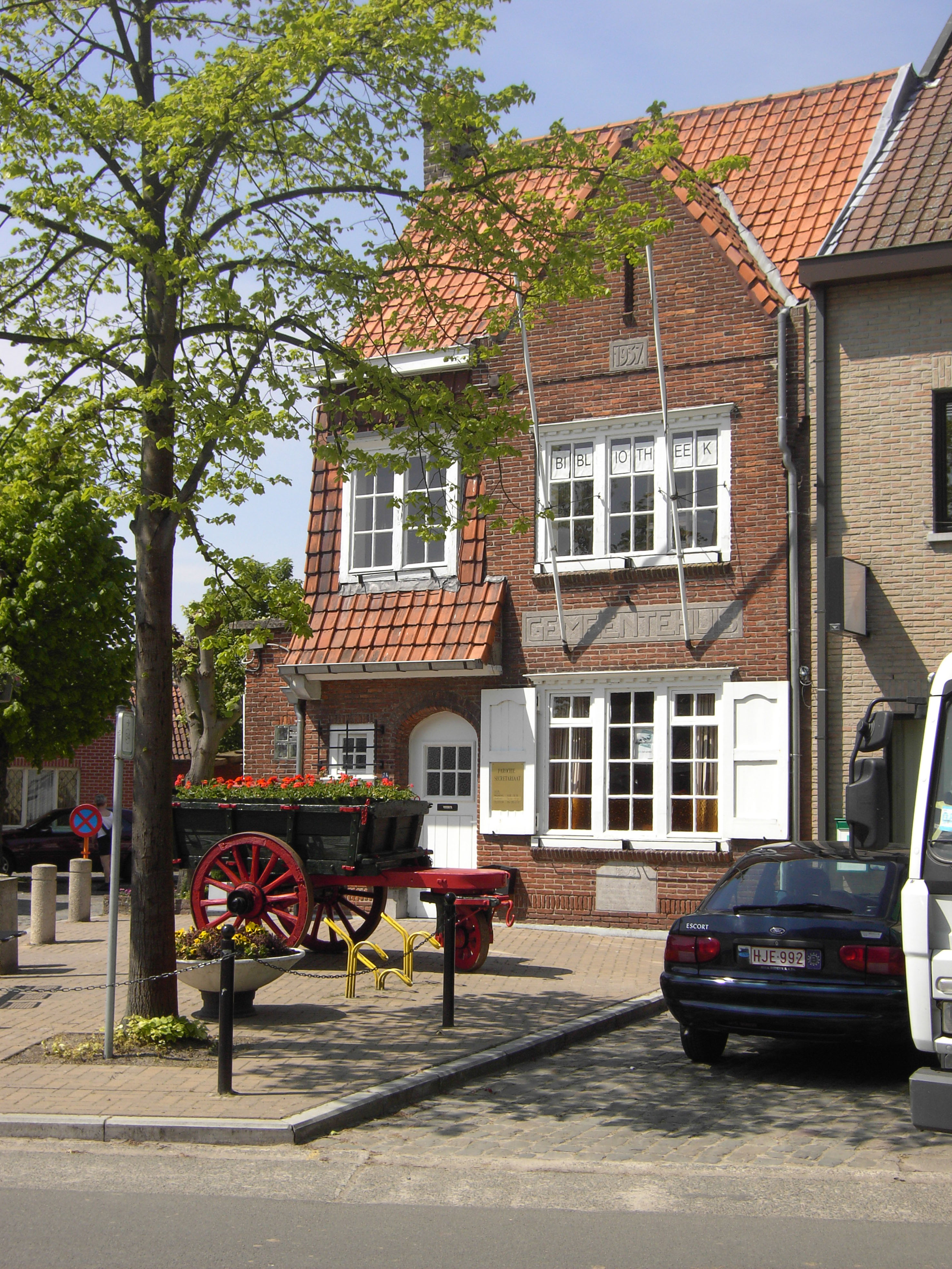 Zevergem - De Pinte - Belgium - voormalig gemeentehuis (1937)